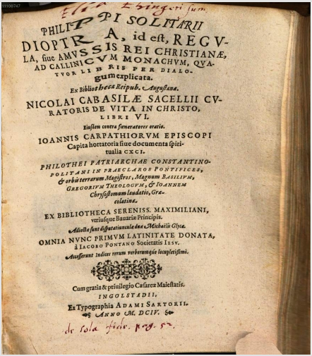 Филипп Монотроп Диоптра на латыни, издание 1604 год